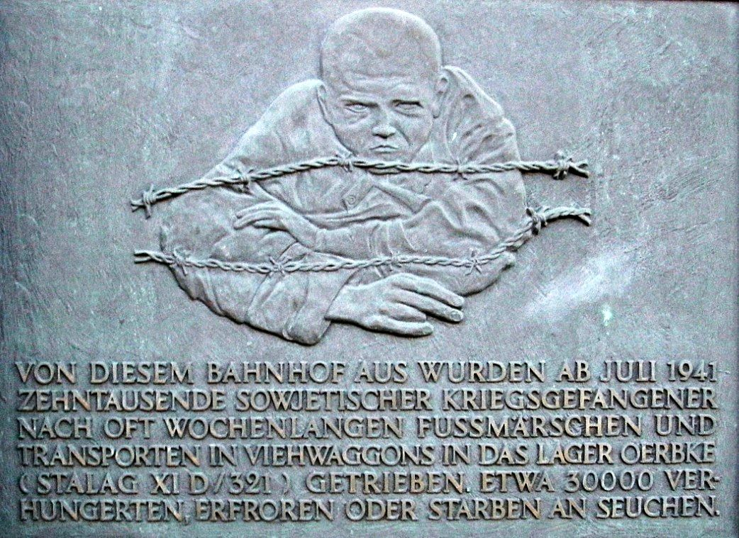 Gedenktafel über den Transport von Kriegsgefangenen in das Lager Oerbke (STALAG XI D (321). Die Tafel ist am Gebäude des Bahnhofs Bad Fallingbostel befestigt.